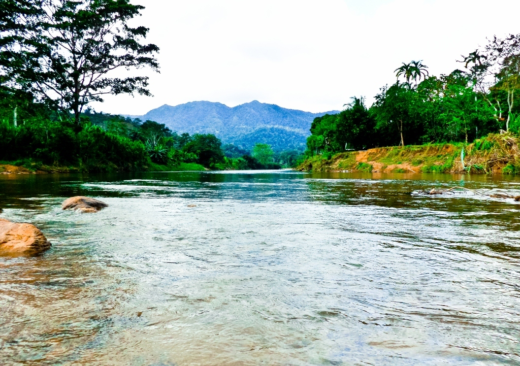 Rio Bambana, en Betania, Rosita, RAAN, Nic.